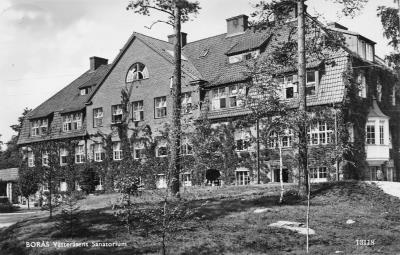 Västeråsens sanatorium. Byggnadsår 1917, rivet 1977. Arkitekt Ivar Tengbom